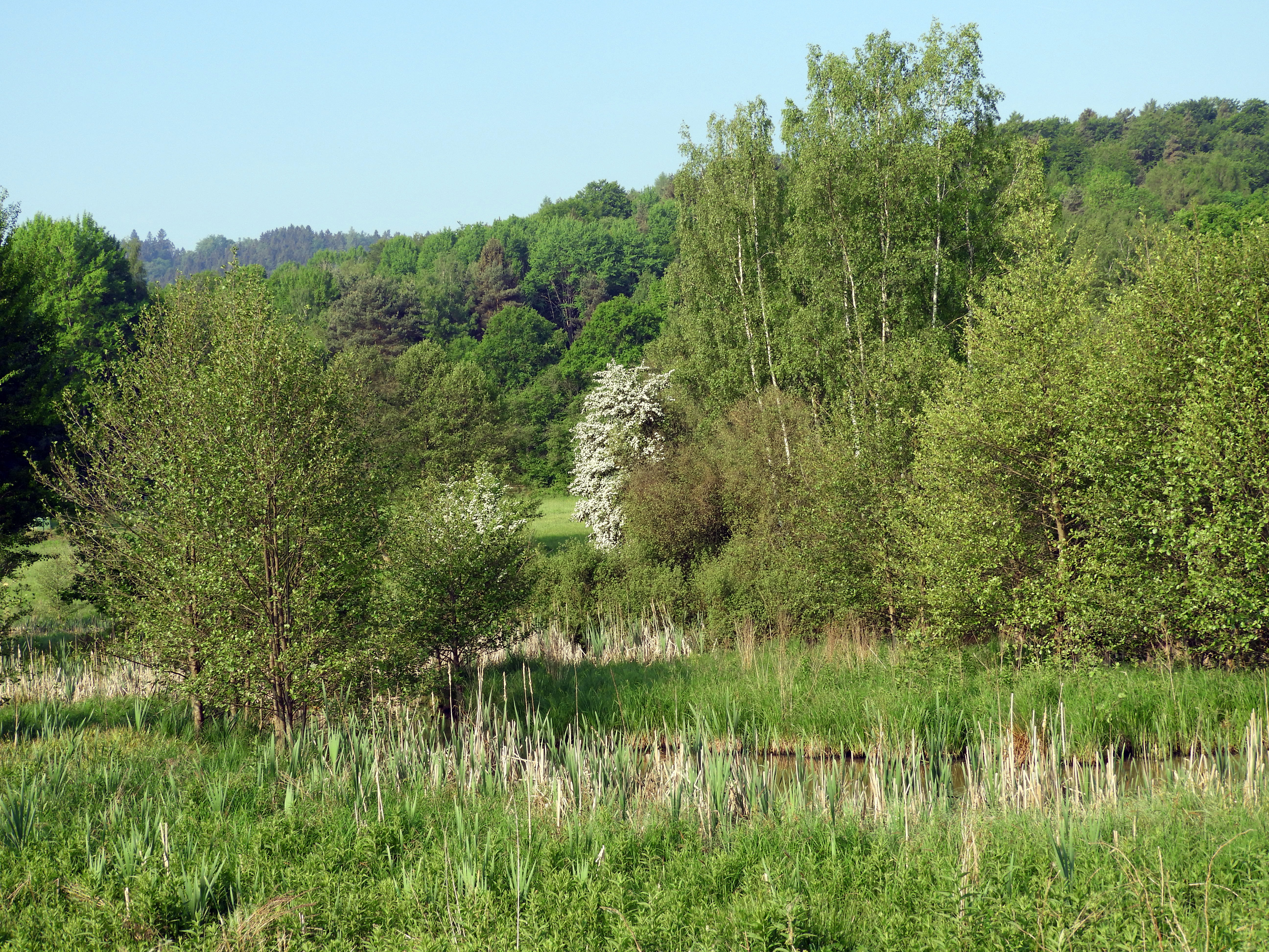 Stillgewässer mit Röhrichtsaum im südlichen Teil. Der "Säulingssee bei Kleinensee" ist ein Naturschutzgebiet westlich des Heringer Stadtteils Kleinensee im Landkreis Hersfeld-Rotenburg, unmittelbar an der Landesgrenze zu Thüringen. Mit einer Größe von rund 2,5 Hektar hat das Naturschutzgebiet den WDPA-ID-Code 165337 und als gleichnamiges Fauna-Flora-Habitat-Gebiet die Nummer 5025-302.